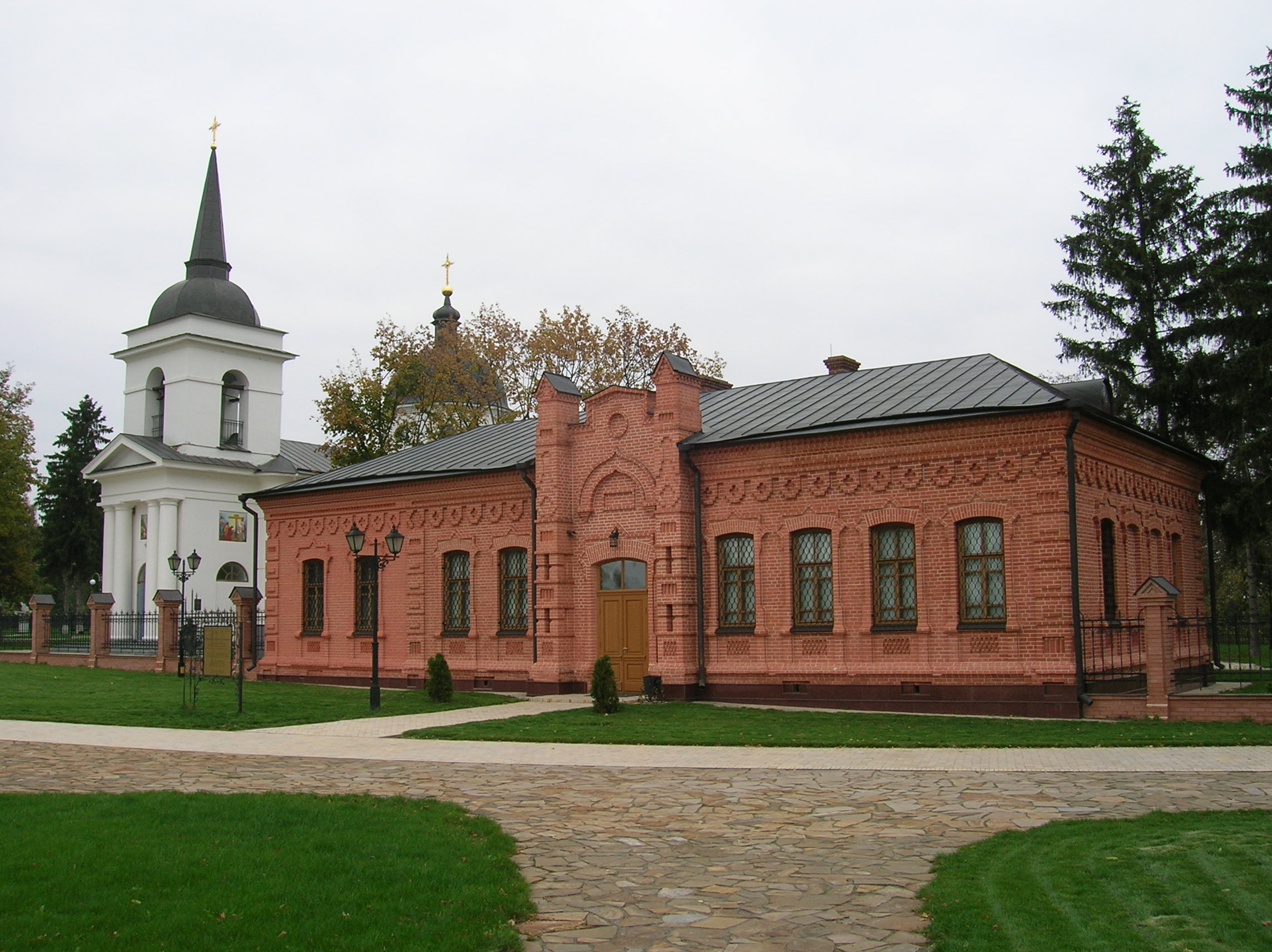 Воскресенська церковнопарафіяльна школа, Музей археології Батурина